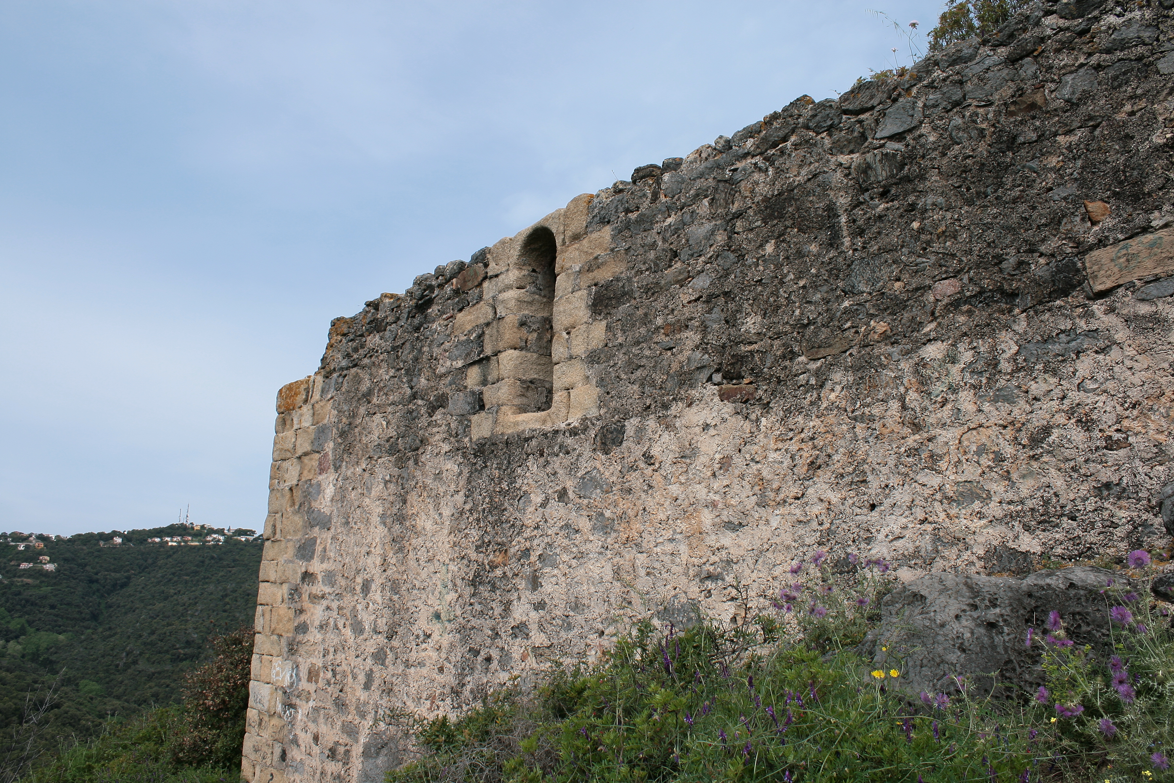 Chateau de Montpalau, muraille.